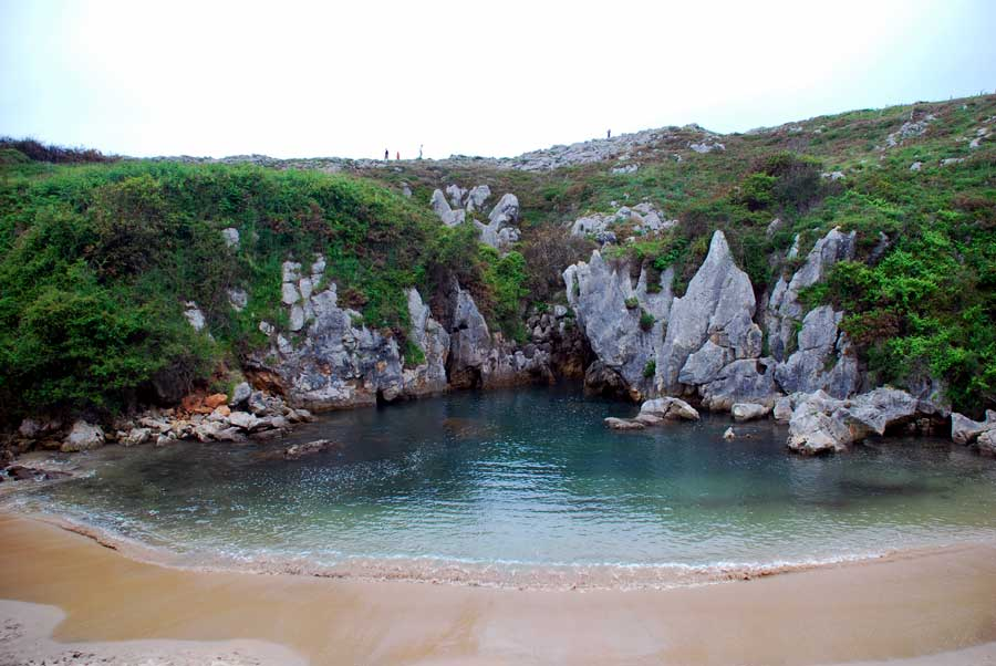 Playa de Gulpiyuri. Naves de Llanes. Asturies.